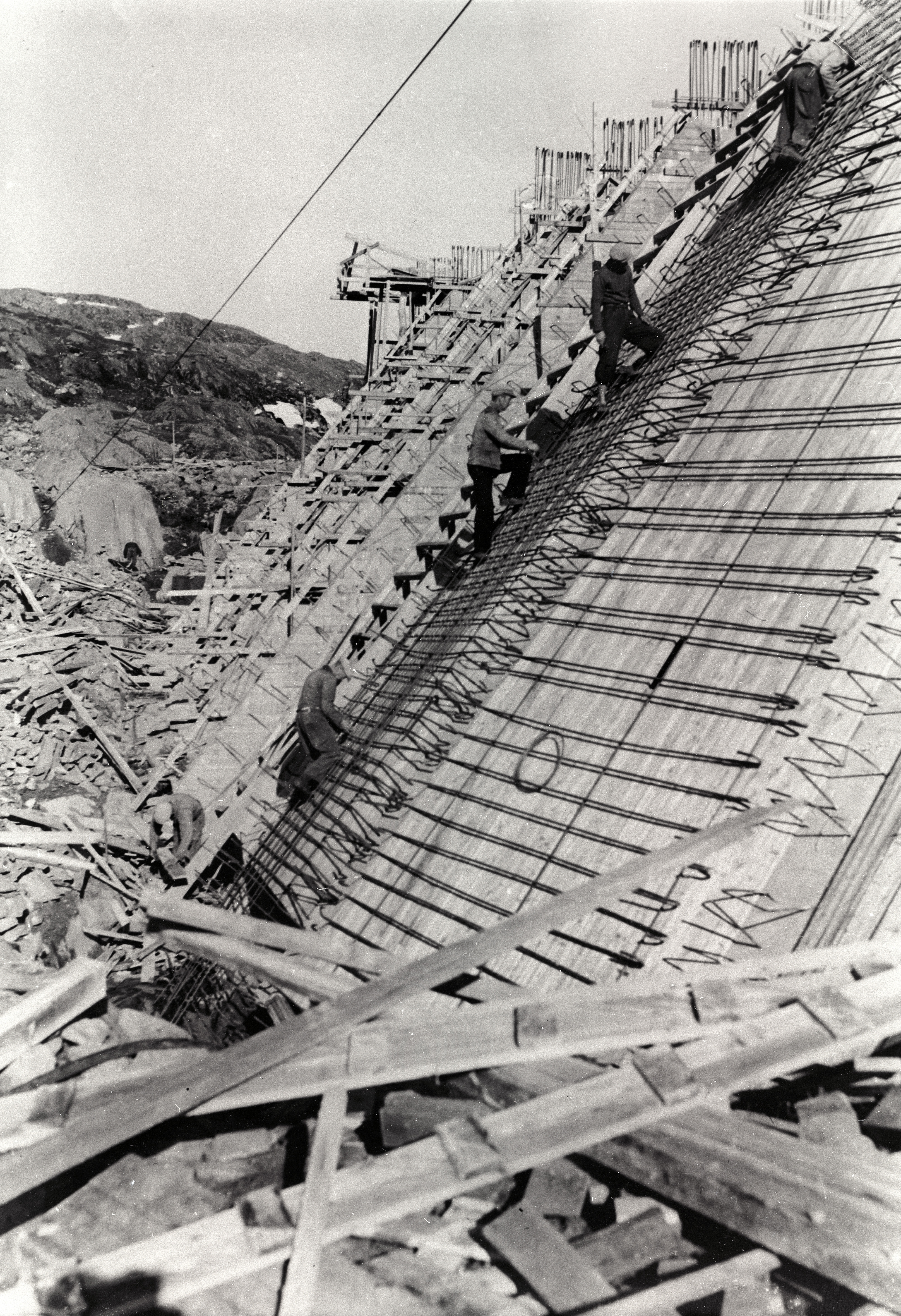 Storglomvatn dambygging 1942, i Nordland Norge